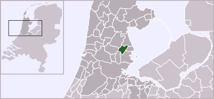 Gemeente Purmerend, gemeentegrenzen 2012 Unknown